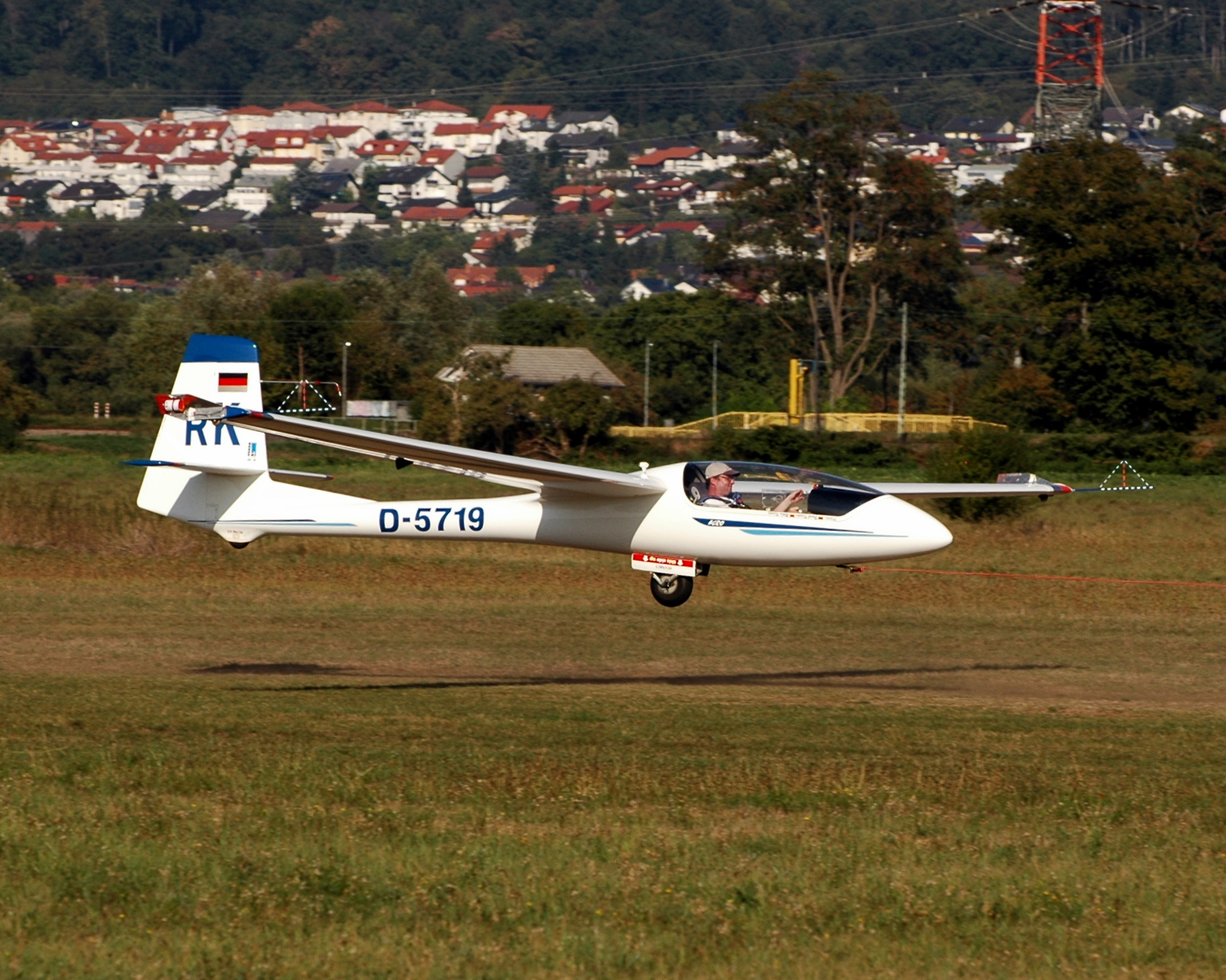 Flugtag Walldorf 2015: PZL Bielsko SZD-59 Acro D-5719